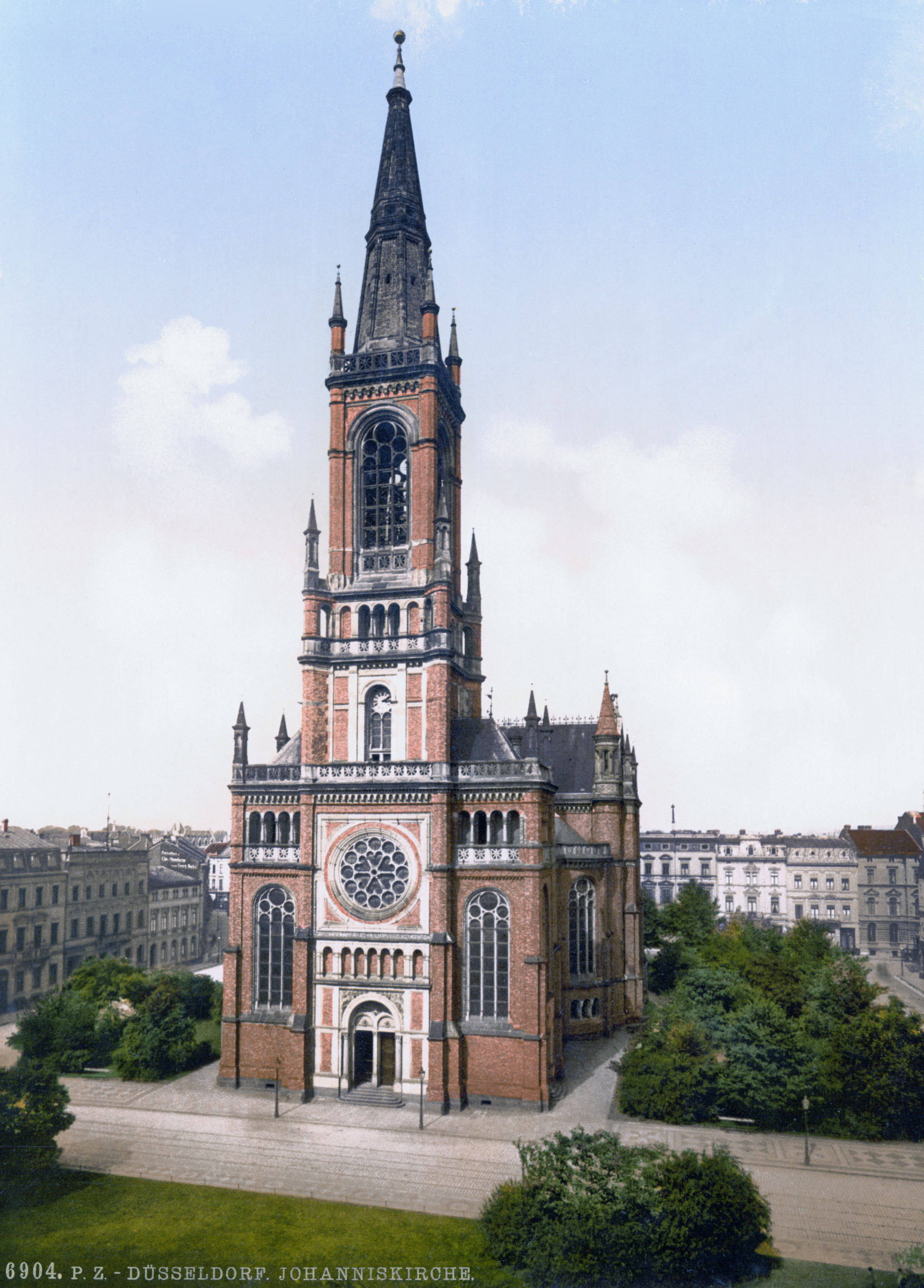 Johanniskirche Düsseldorf um 1900